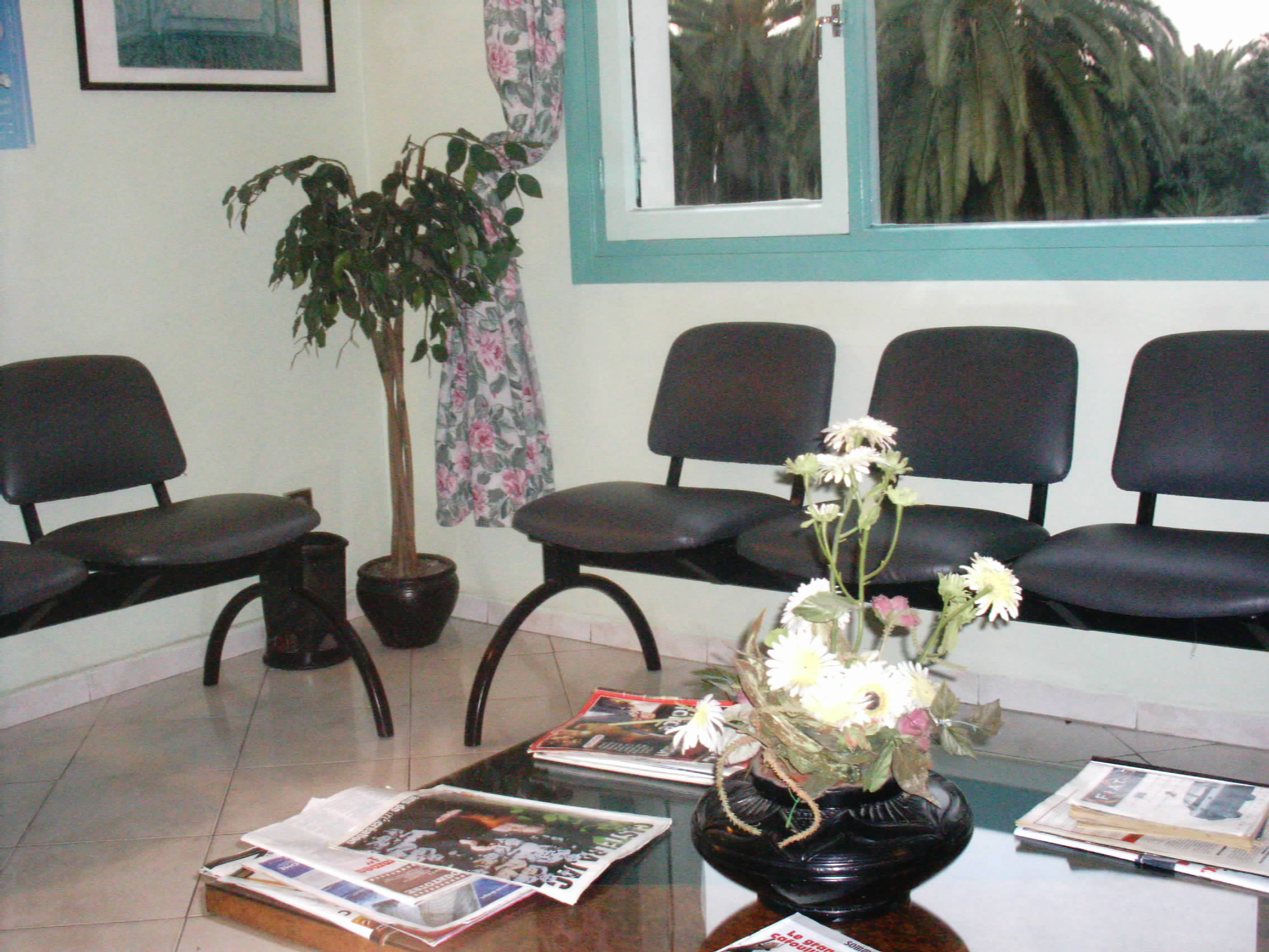 photo prise avec la famille